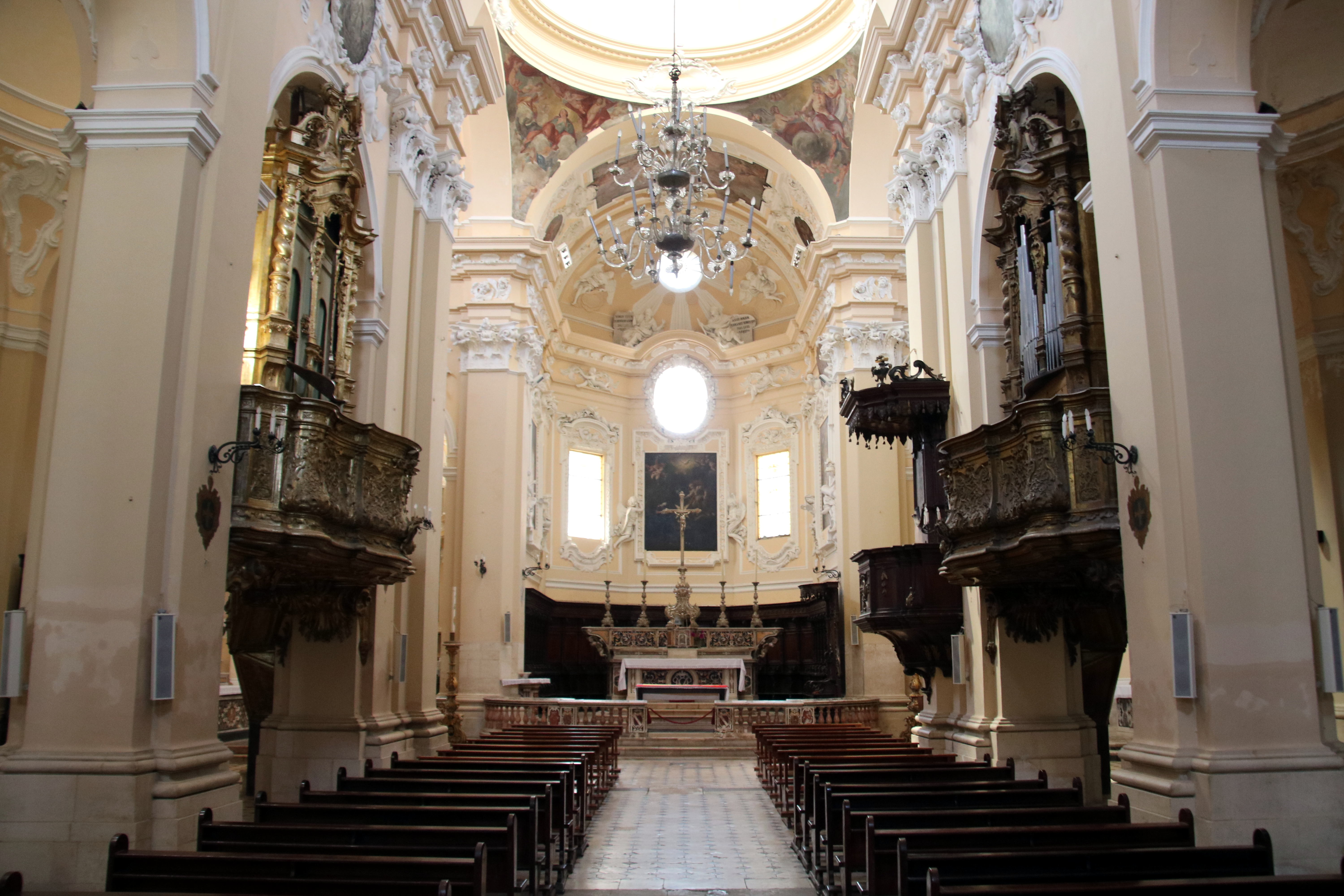 Chiesa della Santissima Annunziata (Sulmona)